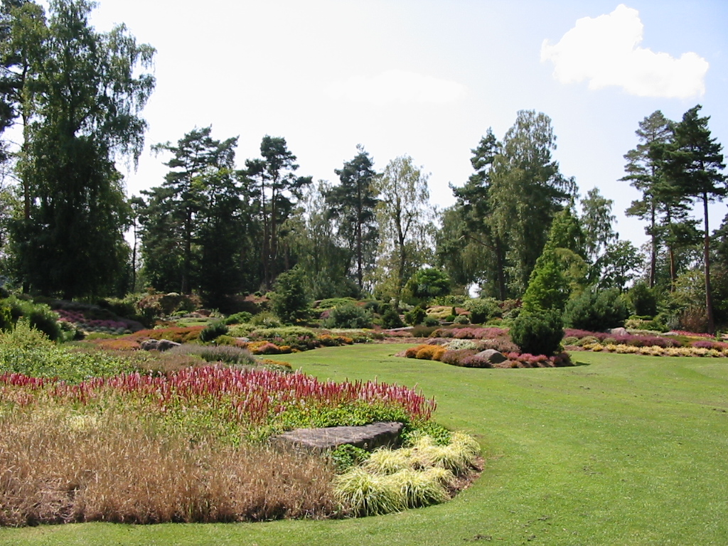 Jardin botanique (botanical garden) des Vosges Commune de Ban-de-Sapt (88210), France Photographie personnelle prise le 18 août 2005. Copyright © Christian Amet